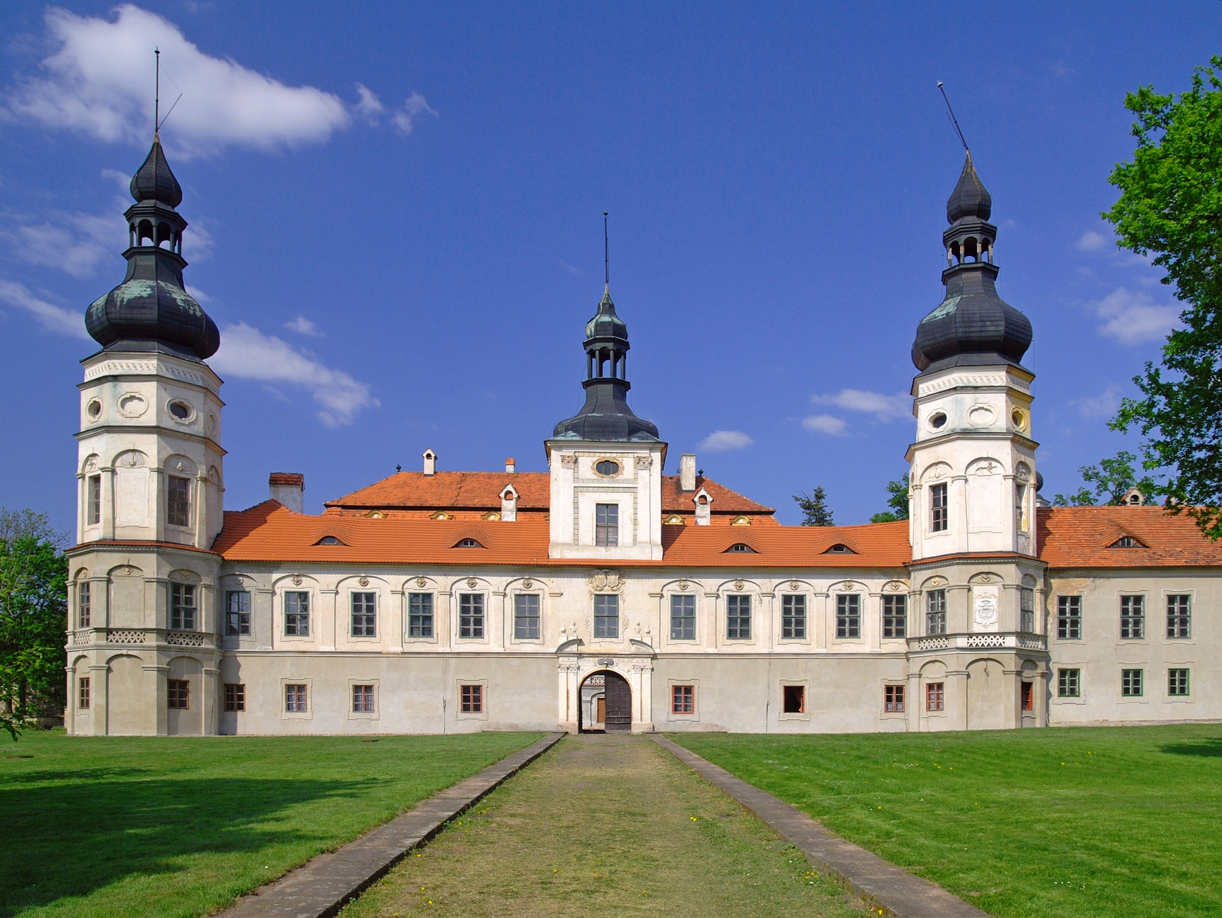 wieś Żyrowa